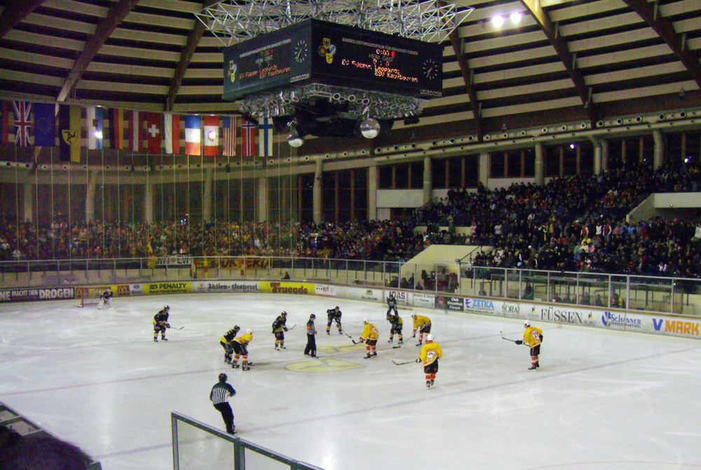 Spielsituation im Spiel EV Füssen gegen ESV Kaufbeuren